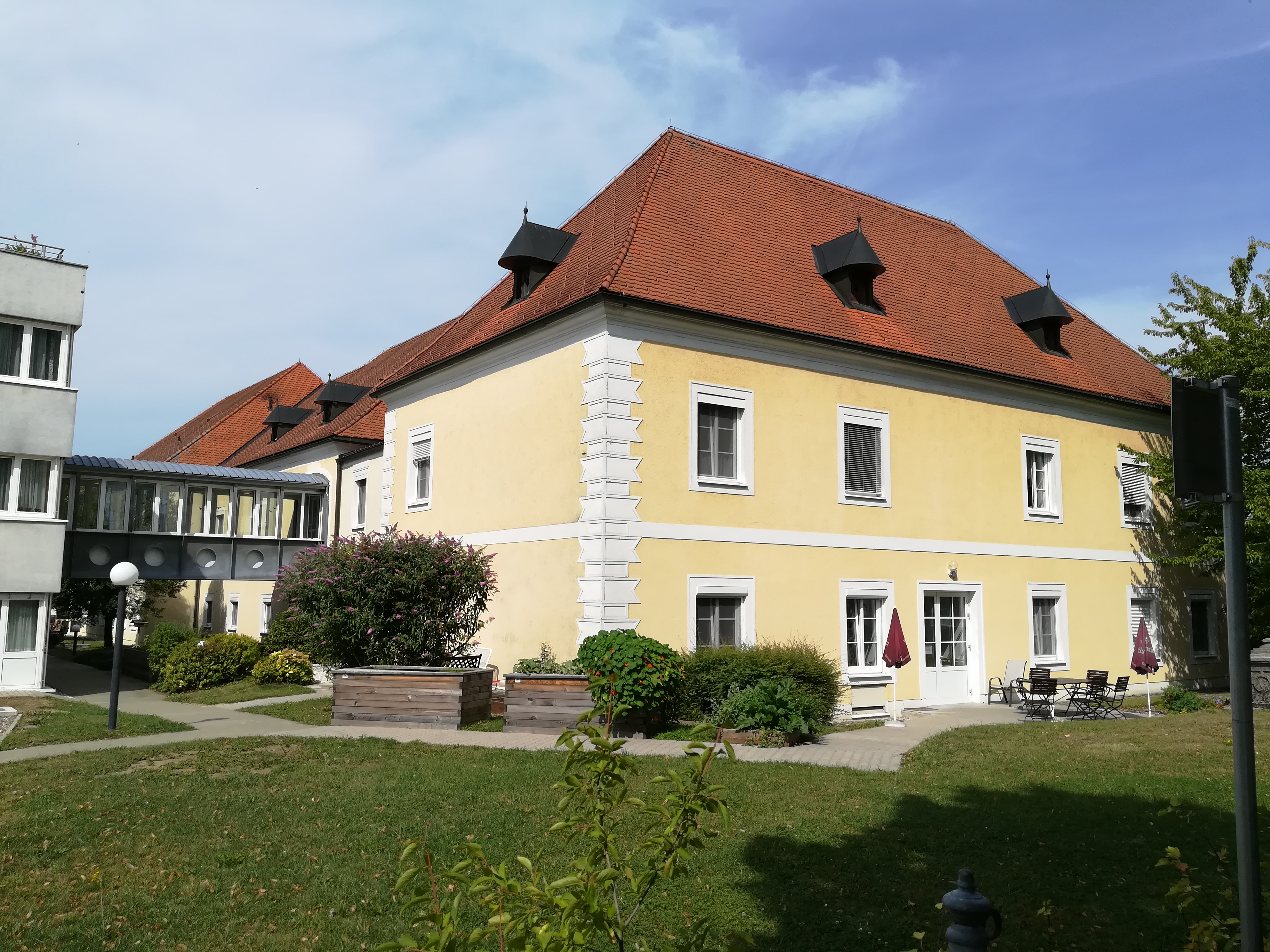 Schlos Hall (Gartenseite)